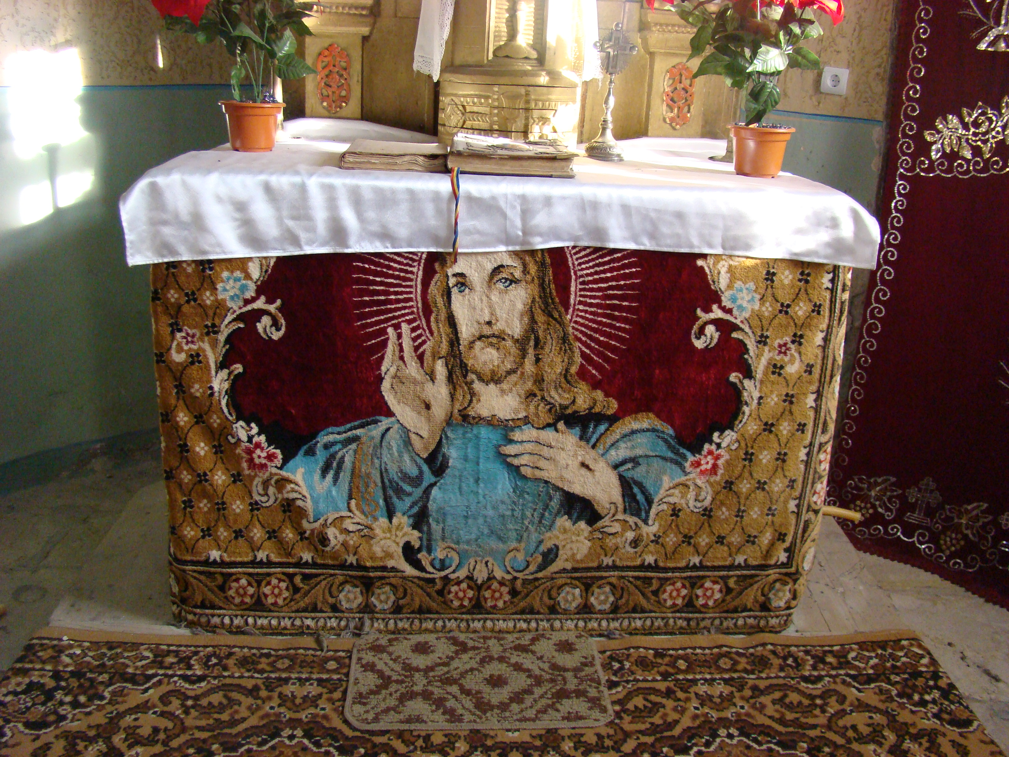 Biserica „Sfinții Arhangheli Mihail și Gavril", sat aparținător Satu Nou de Sus; oraș Baia Sprie